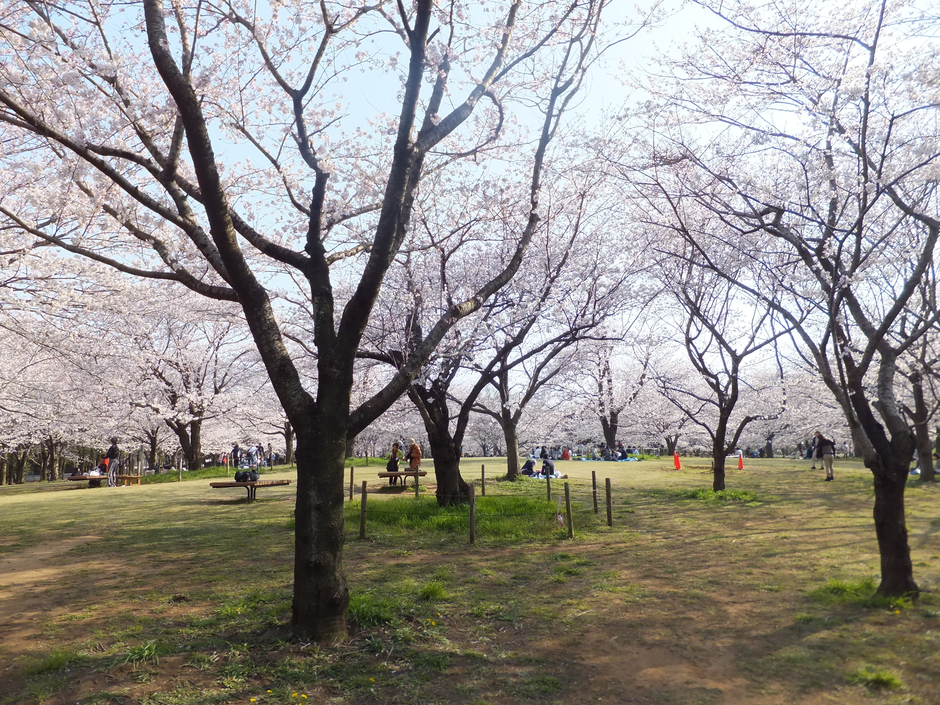 千葉県立青葉の森公園（千葉市中央区）